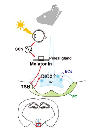 Los ojos son el único órgano fotorreceptor en los mamíferos. La información de la luz se transmite a través del núcleo supraquiasmático (SCN) a la glándula pineal. La información fotoperiódica está codificada por el patrón de secreción de melatonina de la glándula pineal. La melatonina regula la "hormona de la primavera", TSH, en la pars tuberalis (PT) de la glándula pituitaria.